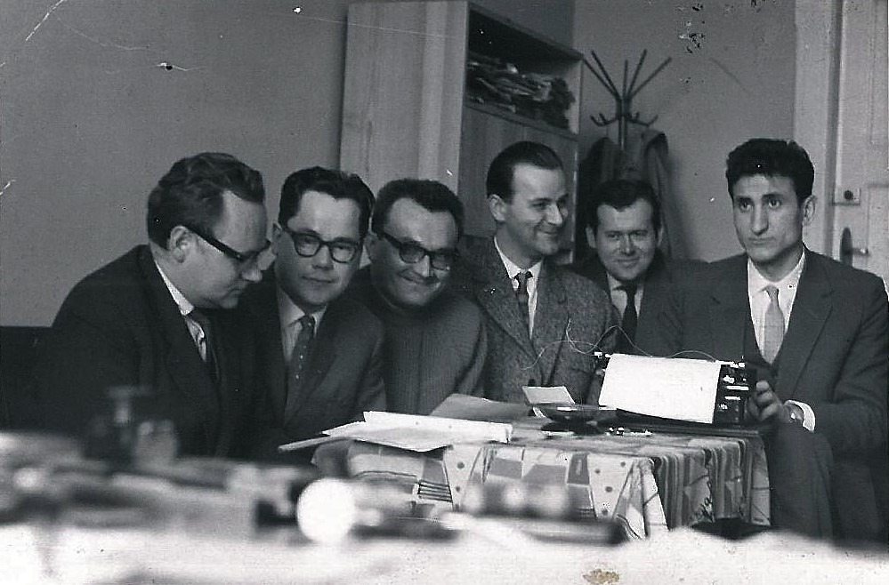 Pracownicy Katedry Historii Filozofii na Wydziale Historyczno-Filozoficznym UAM, w budynku obecnego Collegium Minus. Od lewej do prawej: Jerzy Szymański, Jan Such, Roman Kozłowski, Seweryn Dziamski, Władysław Kot, Józef Bańka. W katedrze pracowało w niewiele osób. Cała filozofia mieściła się w trzech salkach, z których jedną większą zajmowali wszyscy pracownicy (dwaj adiunkci, tj. dr Jan Such i mgr Mieczysław Jarosz oraz asystenci piszący doktoraty), w drugiej, mniejszej, był gabinet kierownika katedry (dra Stefana Kaczmarka), a w trzeciej odbywały się zajęcia z filozofii.